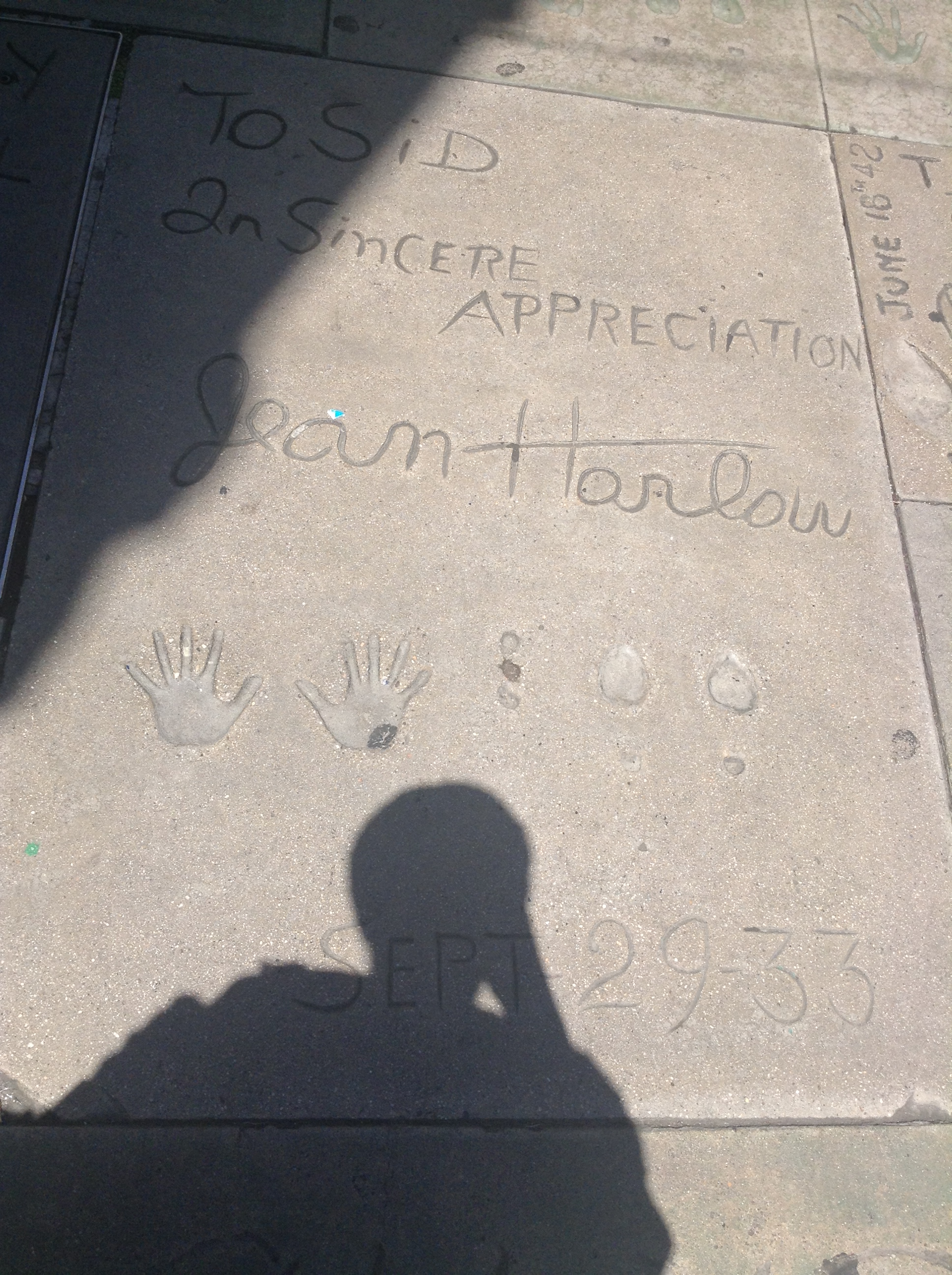 Jean Harlow Grauman's Chinese Theatre (2015)